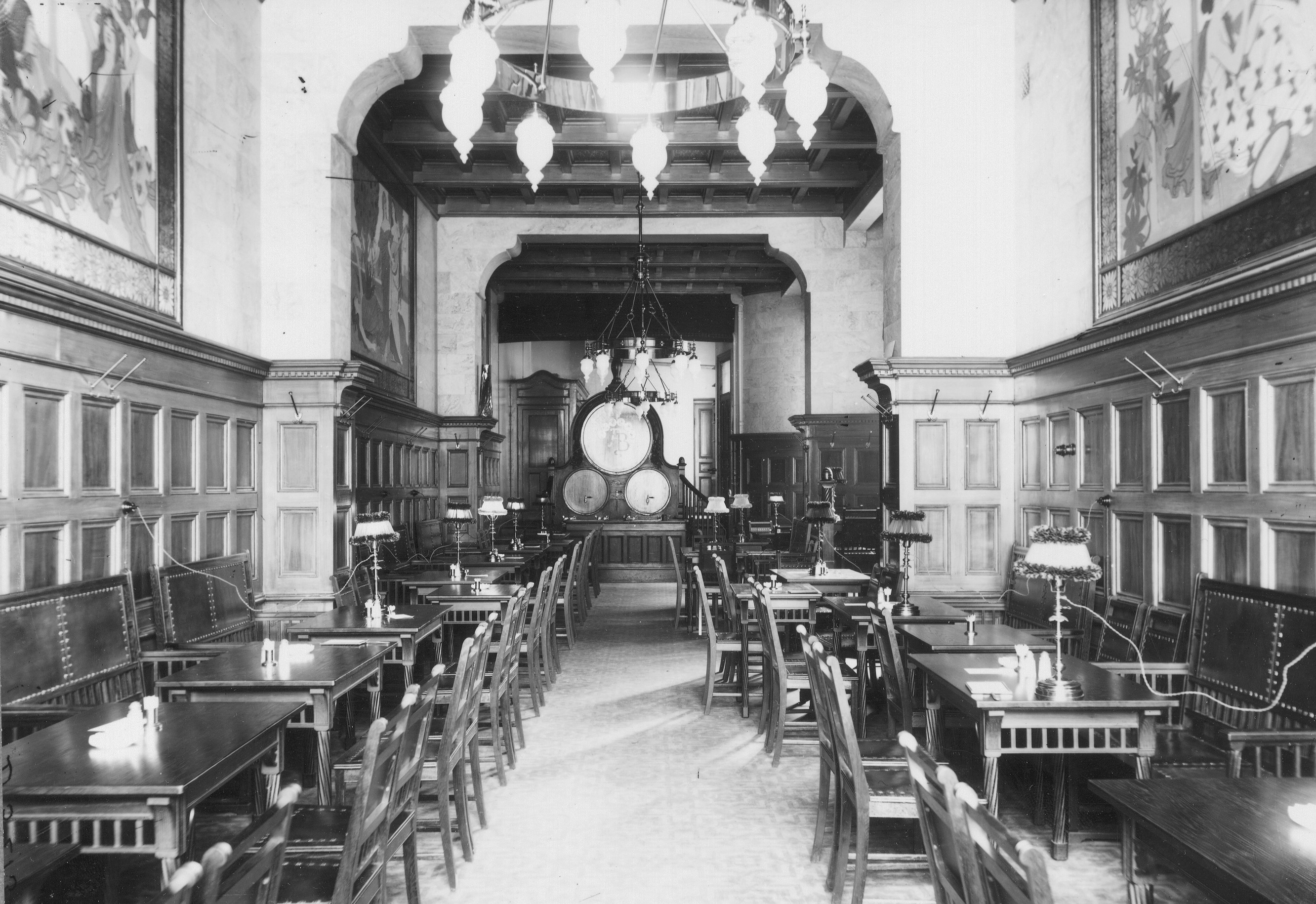 Ölstugan "Malta" sedermera Sturehof, interiör